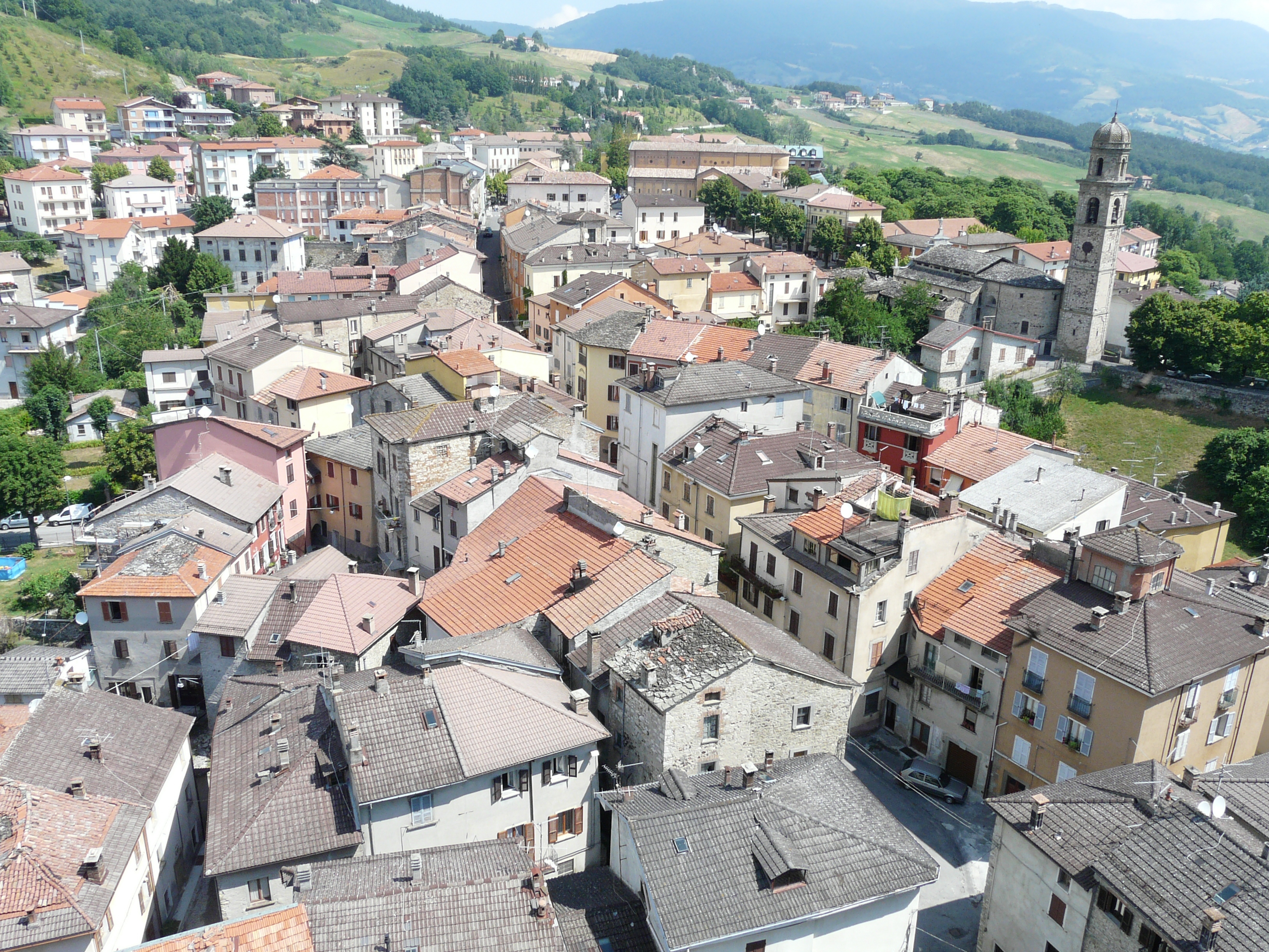 Panorama di Bardi, Emilia-Romagna, Italia